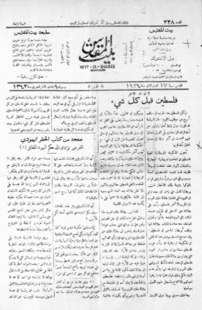 صحيفة أسبوعية فلسطينية كانت تصدر في القدس